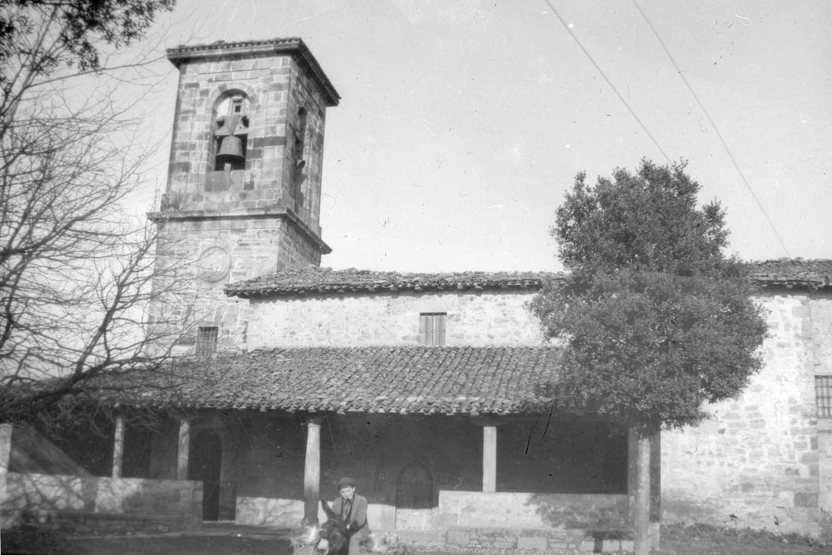 Barajuengo (Aramaio Araba) eliza